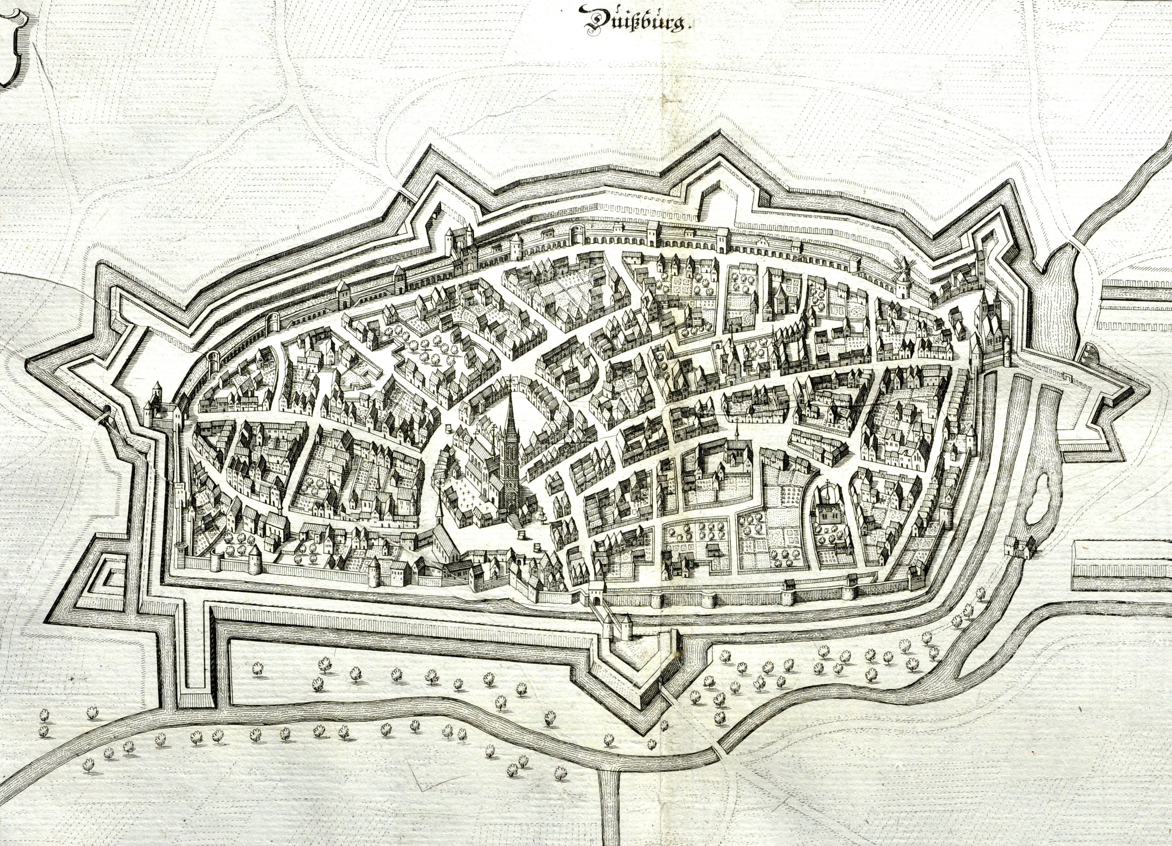 Duisburg, Historische Stadtansicht. Matthäus Merian, »Topographia Westphaliae«, 1647. Fotografie meines Originalexemplares.